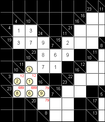 Egen teckning